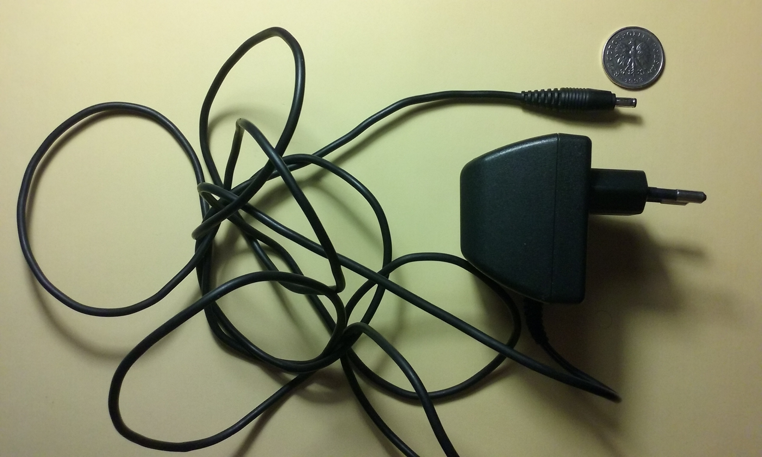 Ładowarka Nokia ACP-7E z końcówką 3,5 mm jack popularnie zwaną grubym bolcem. Jedna z najpopularniejszych ładowarek na przełomie XX i XXI wieku